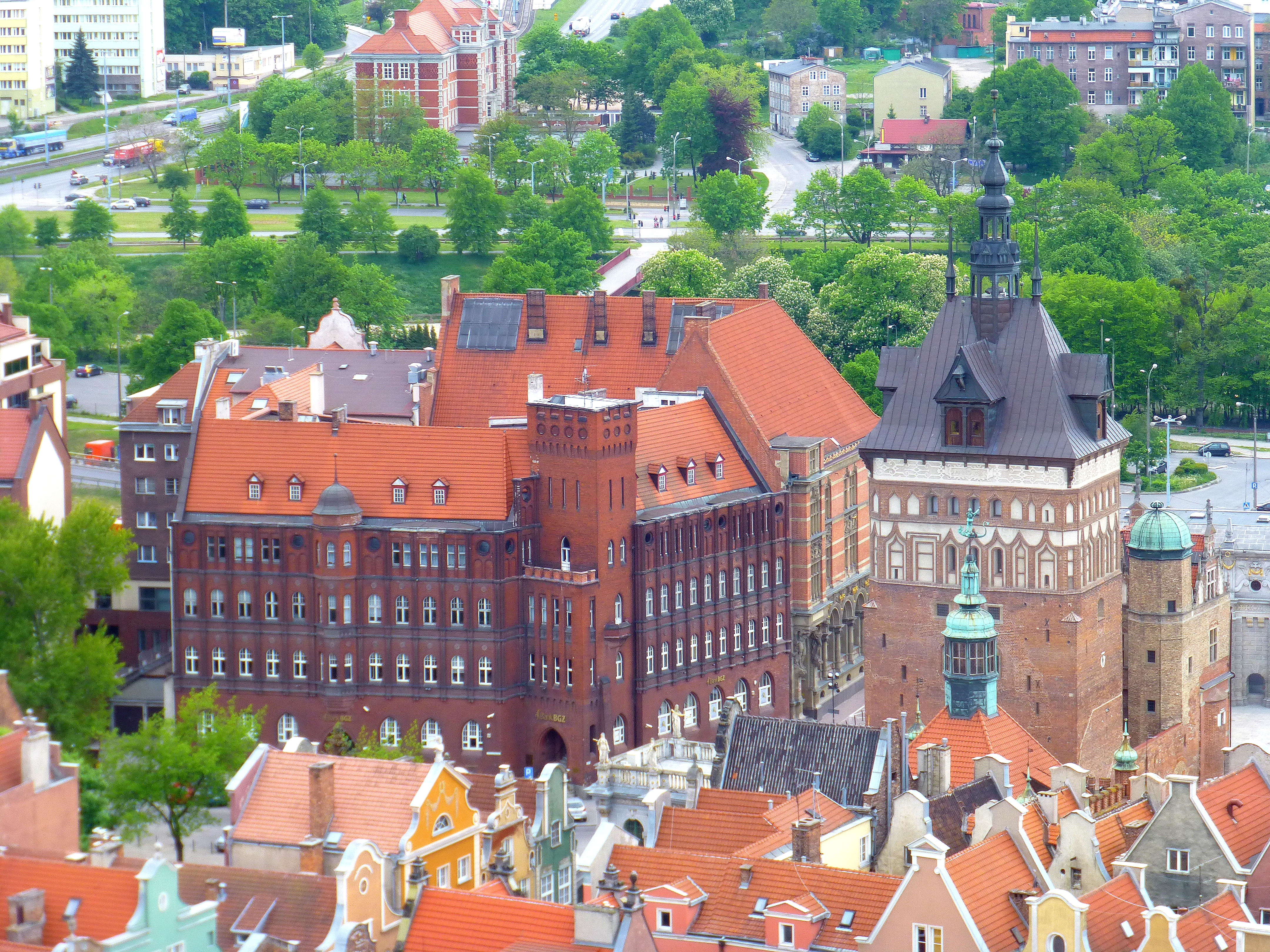 Danzig – Blick von der Marienkirche auf Folterkammer, Gefängnis und Käfigturm --- Komora tortur i więzienie